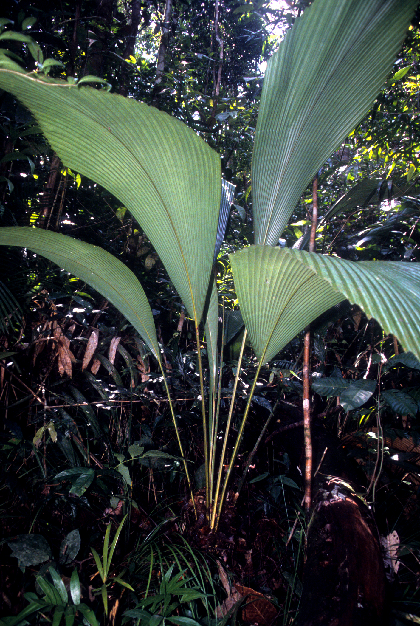 Lata Cemerung, Terengganu, Malaysia. Oct. 2002. from slide.